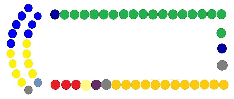 Composición de escaños de la Asamblea Legislativa de Costa Rica